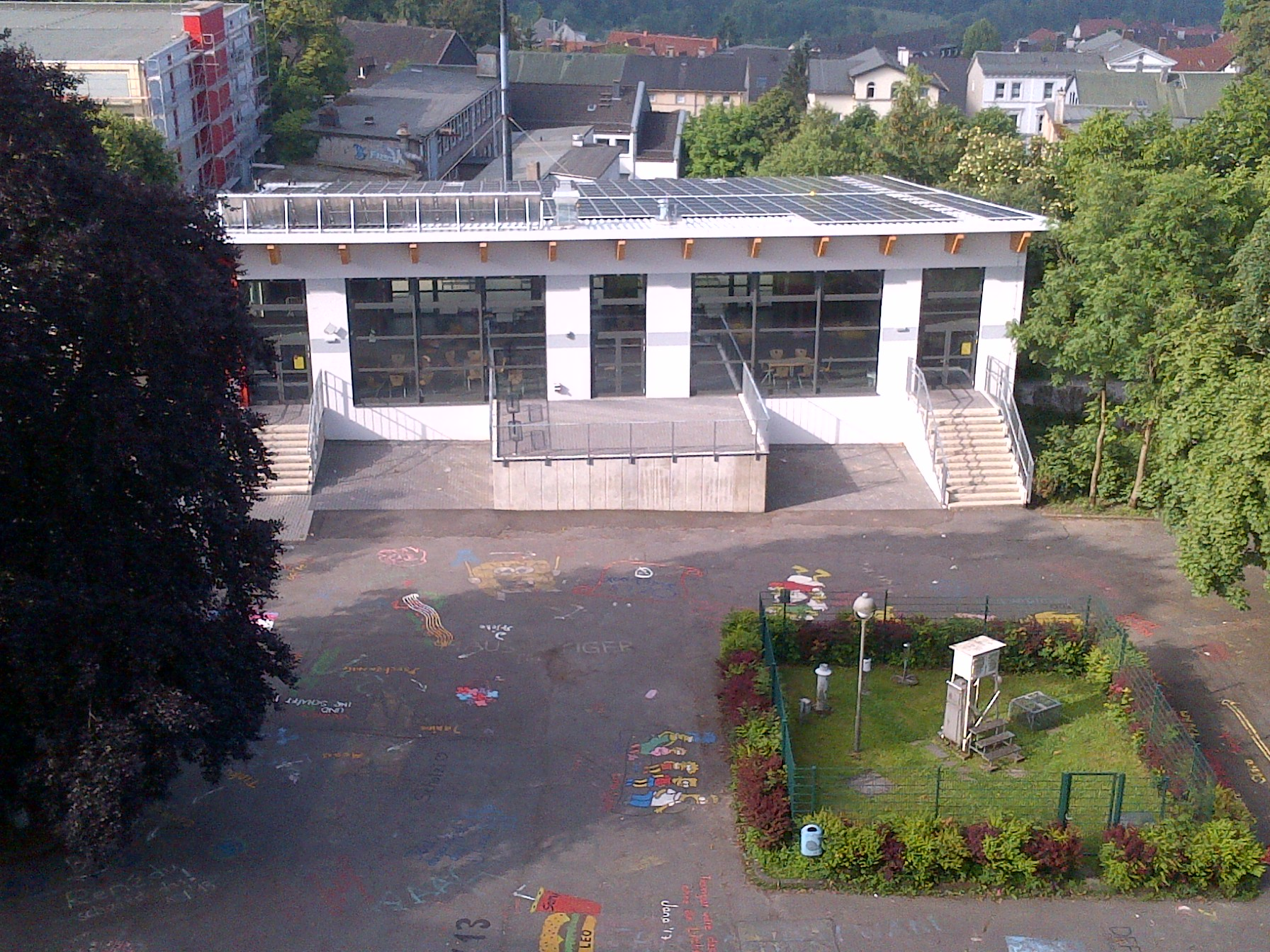 Die Mensa am Staberg, Lüdenscheid, 02.07.2013, Vom Dach des Zeppelin-Gymnasiums, Sonnenschein